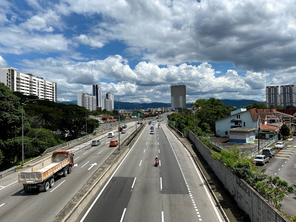 馬來西亞高速道路